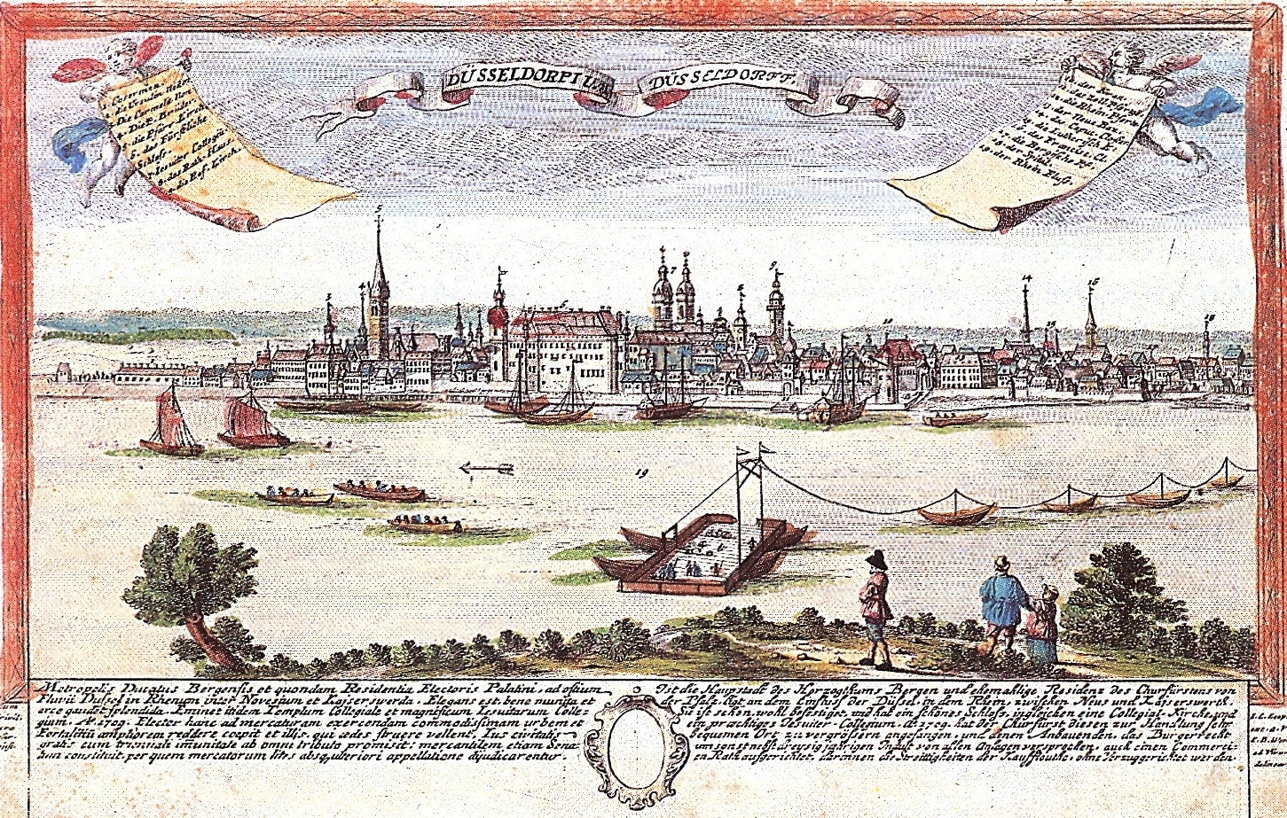 t